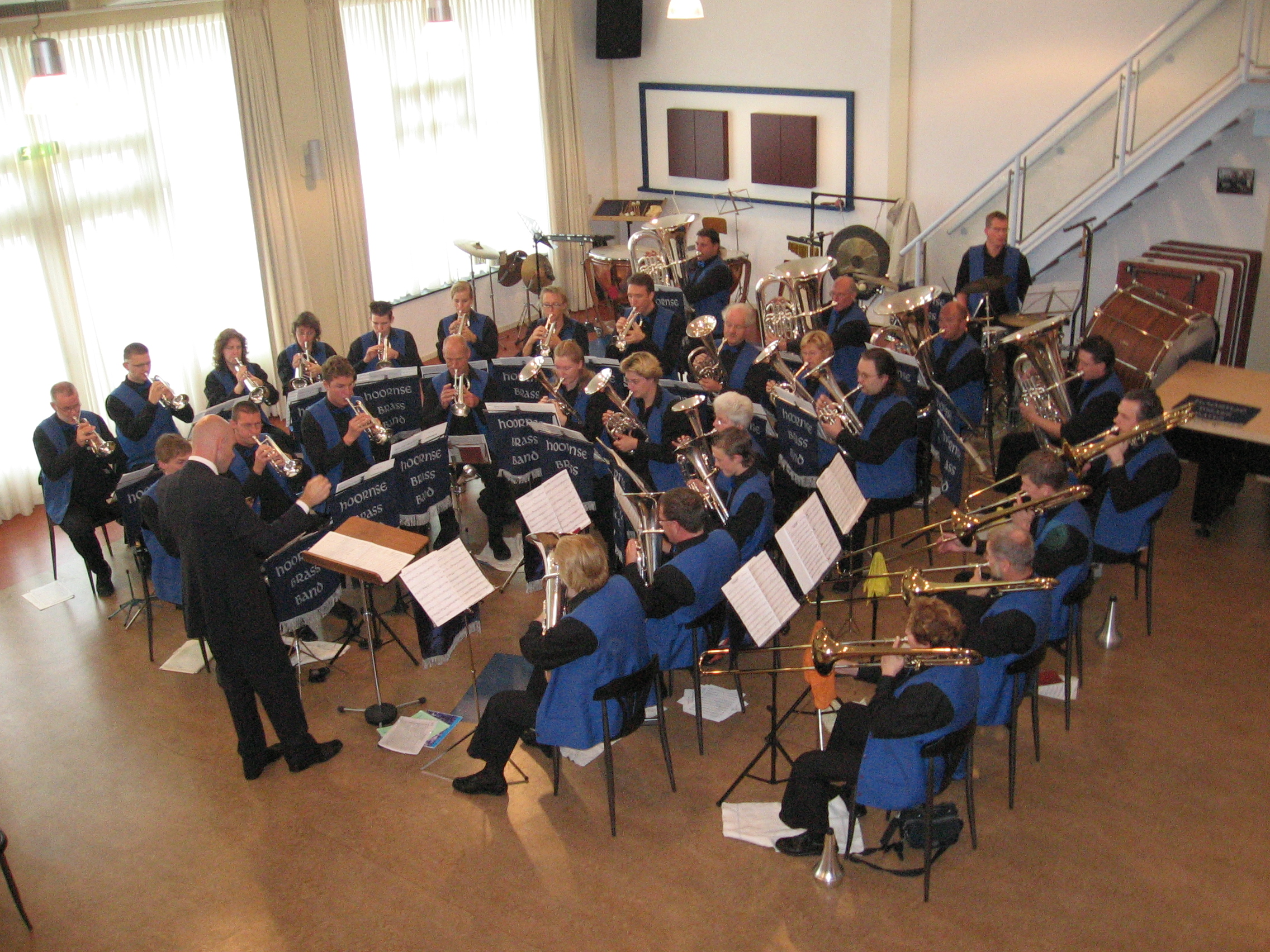 Hoornse Brassband tijdens een concert in "De Mantel" te Spierdijk. Foto van toestemming is per email aangevraagd.